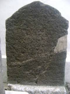 Prasasti Mantyasih, juga disebut Prasasti Balitung atau Prasasti Tembaga Kedu adalah prasasti berangka tahun 907 M yang berasal dari Wangsa Sanjaya, kerajaan Mataram Kuno.